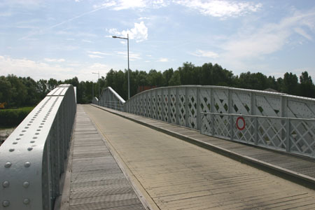 (Mirabrug 2 , eigen foto augustus 2004, hiermee onder GFDL gebracht )